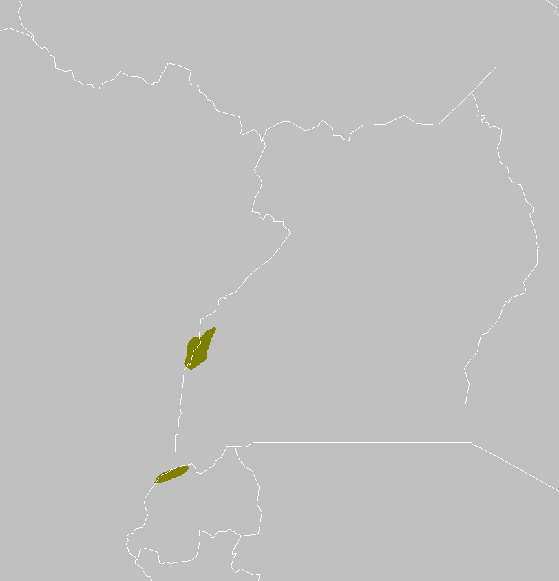 Ruwenzori-Virunga montane moorlands ecoregion map